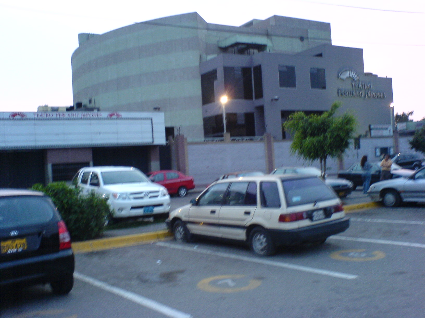 Teatro Peruano Japones en Lima-Peru